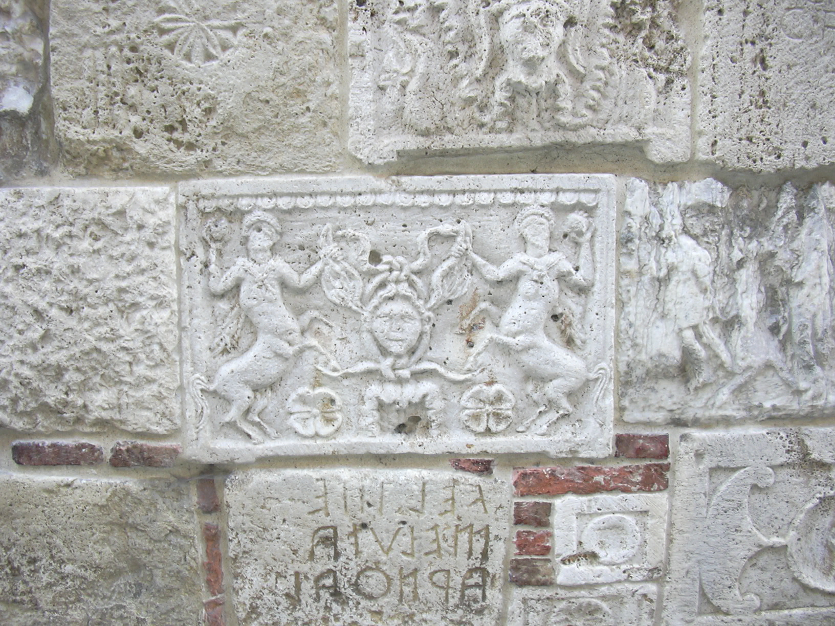 Etrurian tombstone and inscriptions at Palazzo Bucelli in Montepulciano